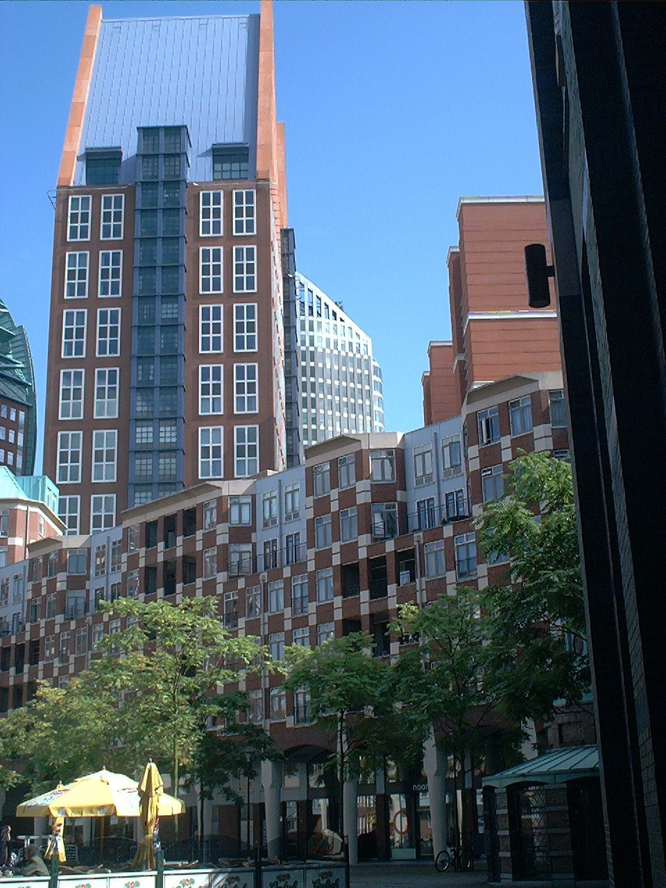 Dubbele licentie Eigen werk Foto gemaakt door Dedalus 13 september 2005 Ministerie VWS Den Haag